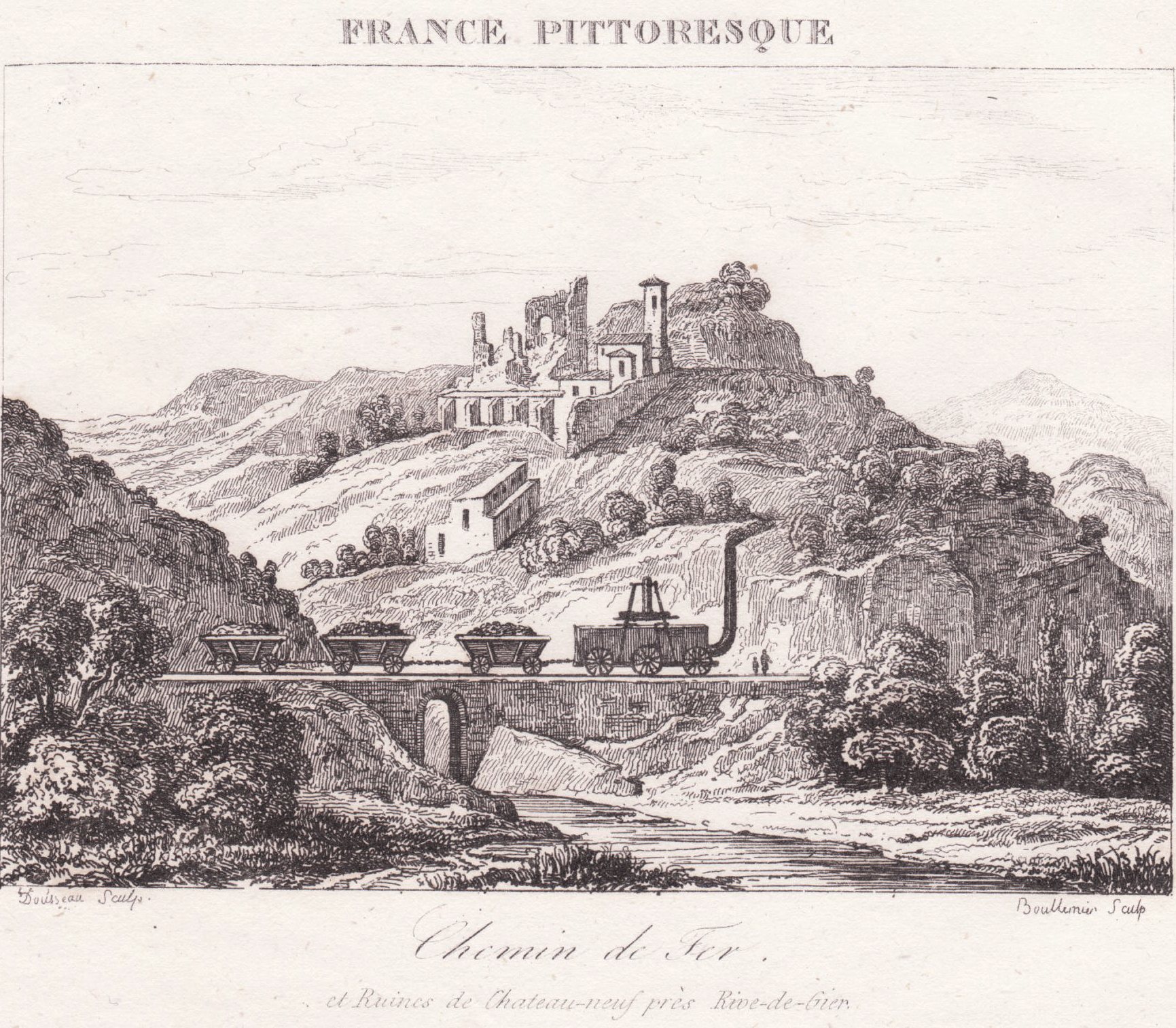 FRANCE PITTORESQUE - Chemin de fer et Ruines de Chateau-neuf pres Rive-de-Gier - Paris circa 1835 - eau-forte de Dousseau et Boullemier